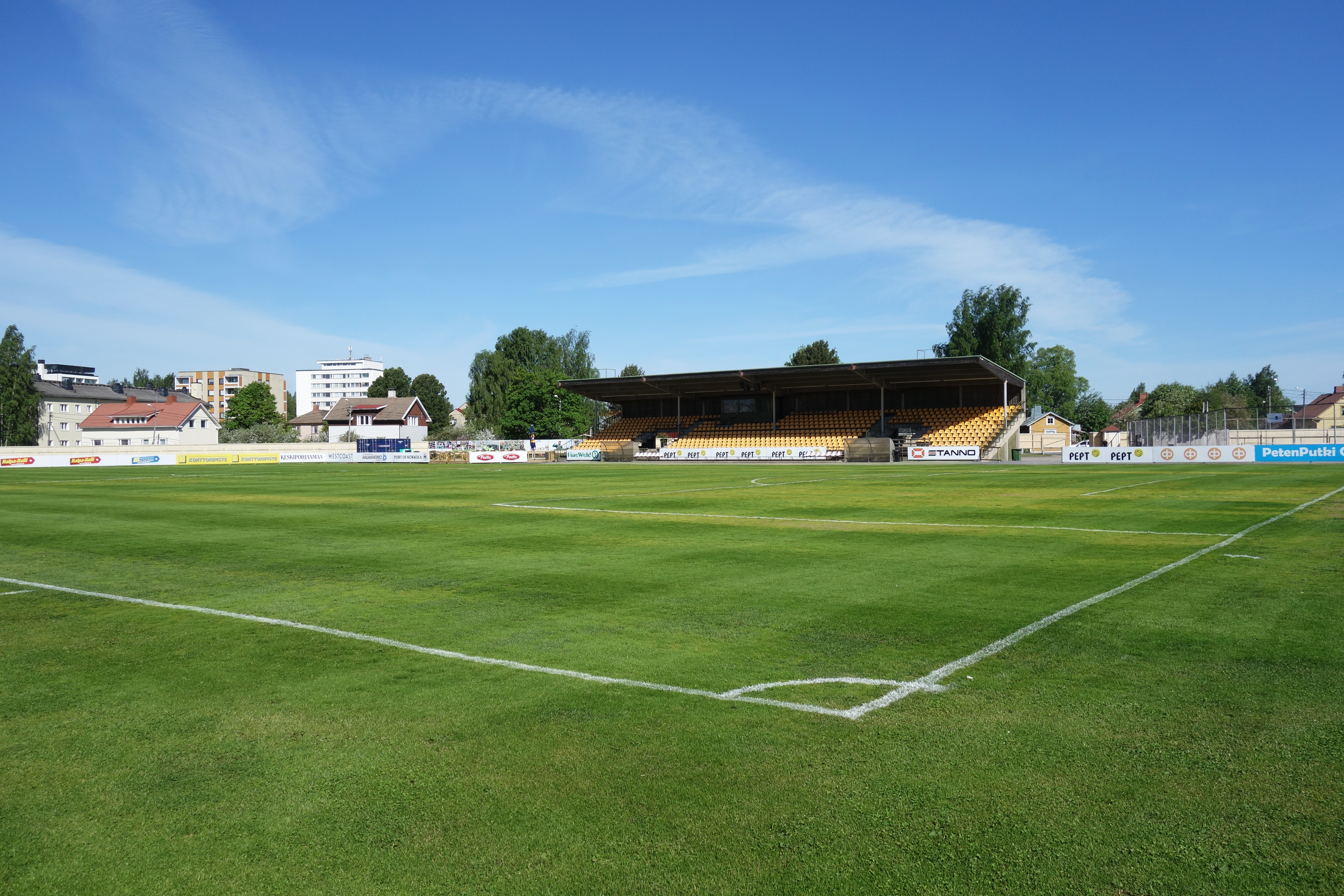 Kokkolan keskuskenttä 17.6.2017